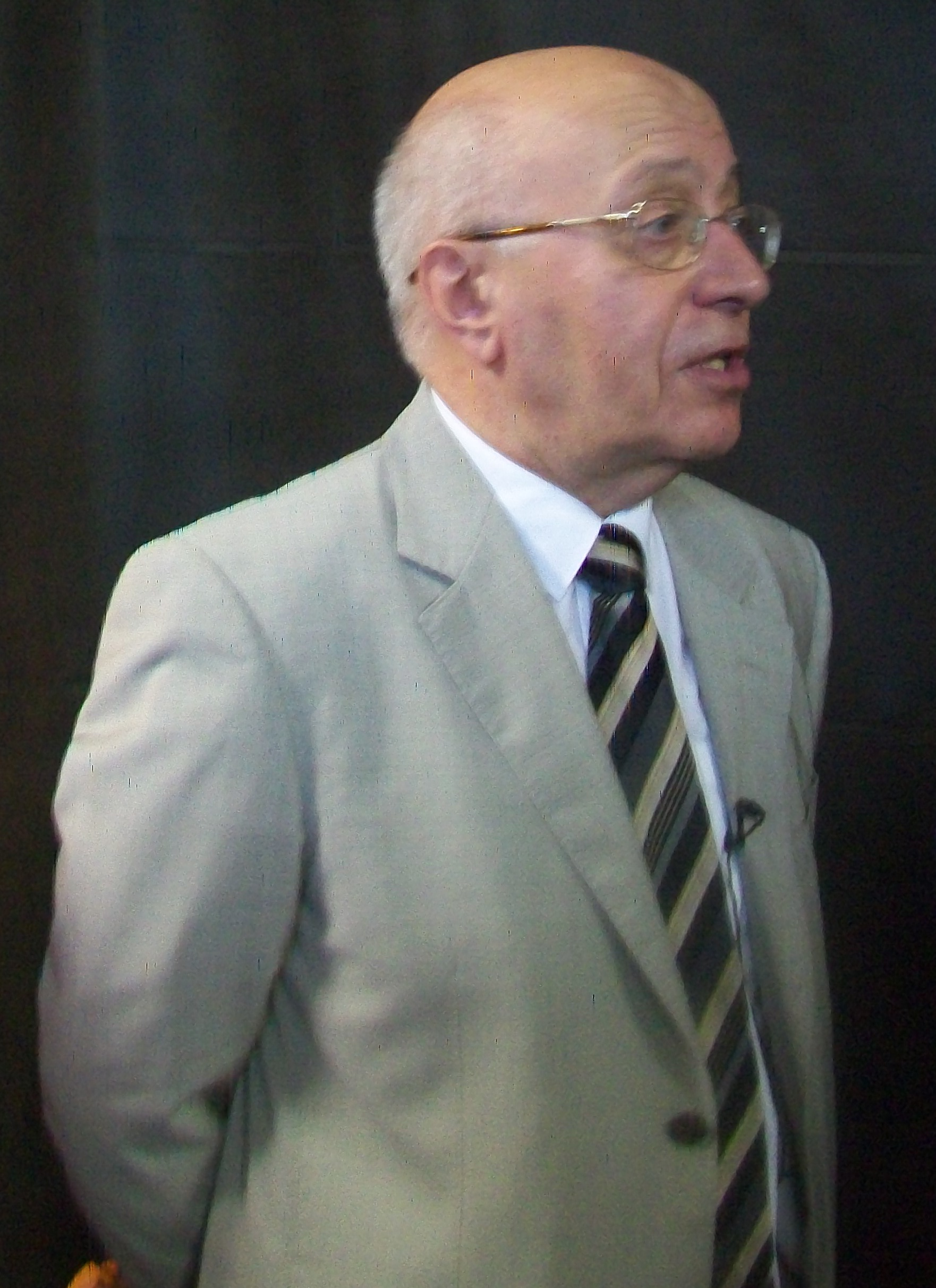 Сергей Ервандович Кургинян отвечает на вопросы перед съездом движения "Суть времени". Екатеринбург, 27 мая 2017 года